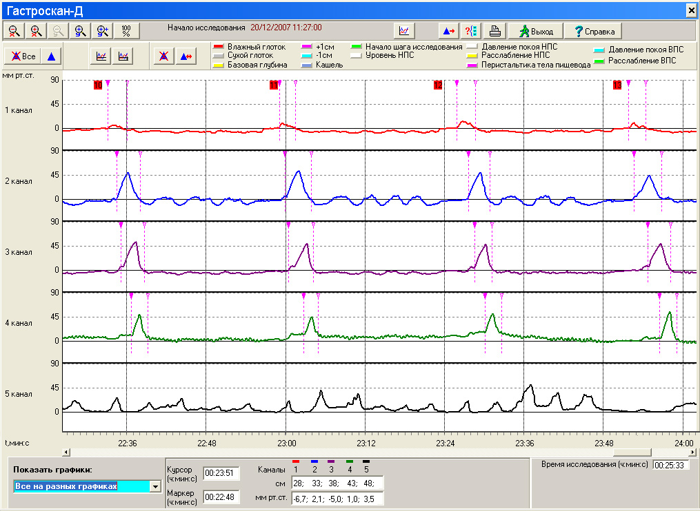 Пример результатов манометрии пищевода, полученный с помошью прибора "Гастроскан-Д"